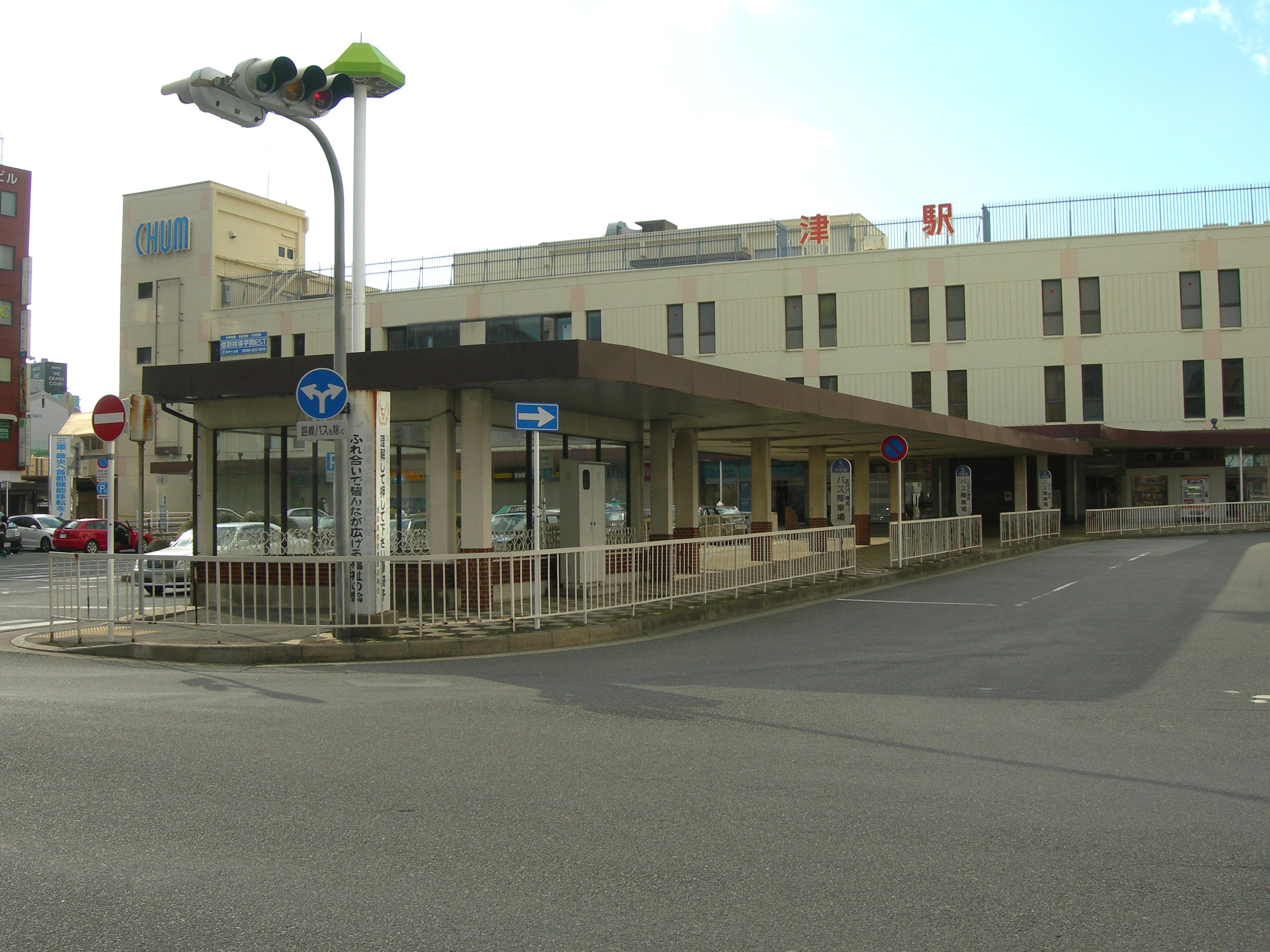 津駅 (三重県)